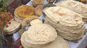 Naxçıvan lavaşı